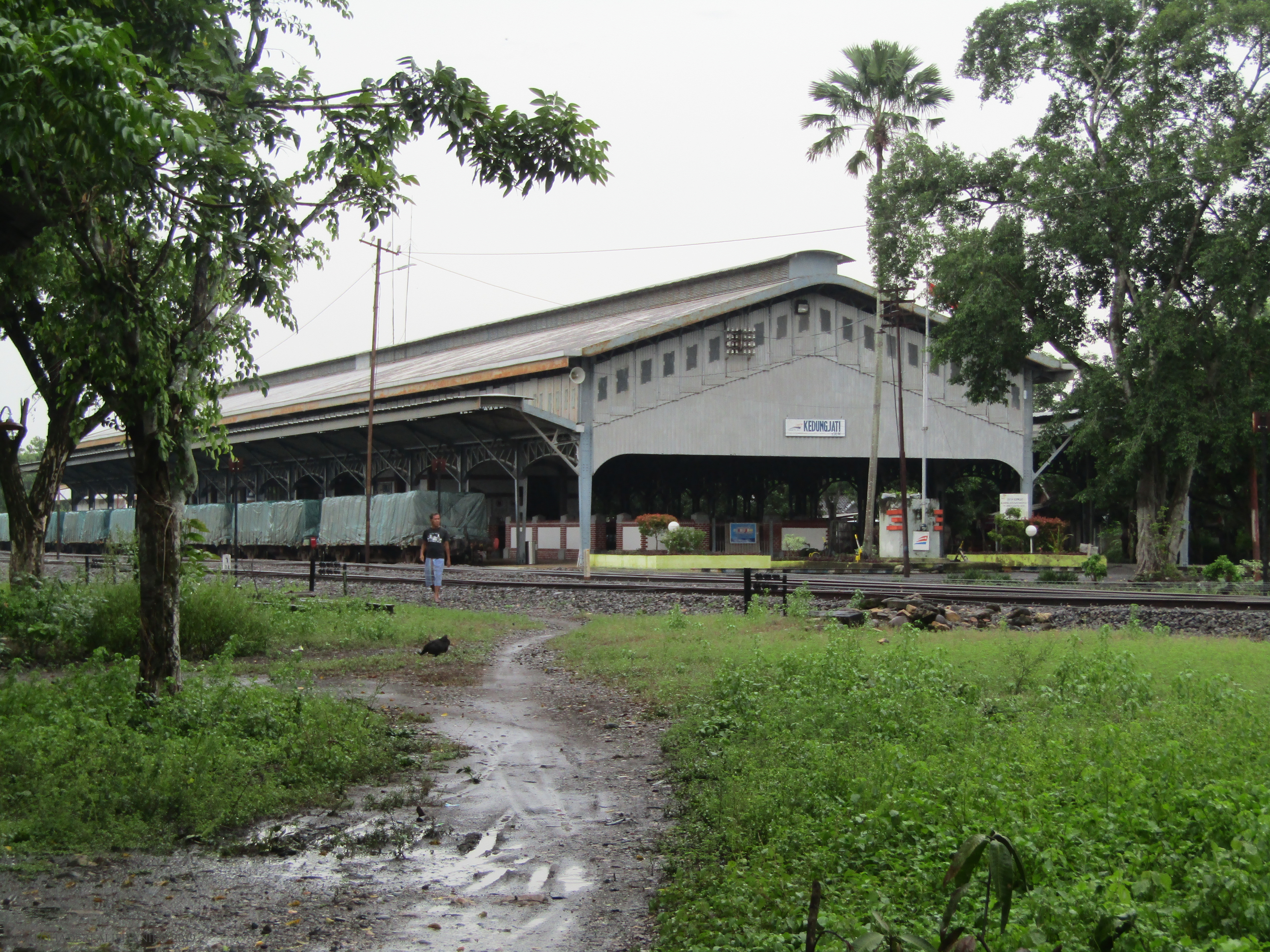 Tampak perspektif Stasiun Kedungjati dengan kereta api semen sedang berhenti